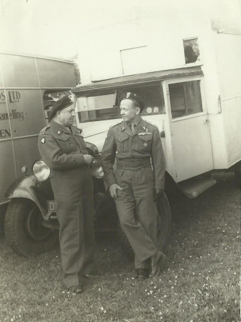 major Kazimierz Kanaś w służbie w 3 Dywizji Strzelców Karpackich, 1947